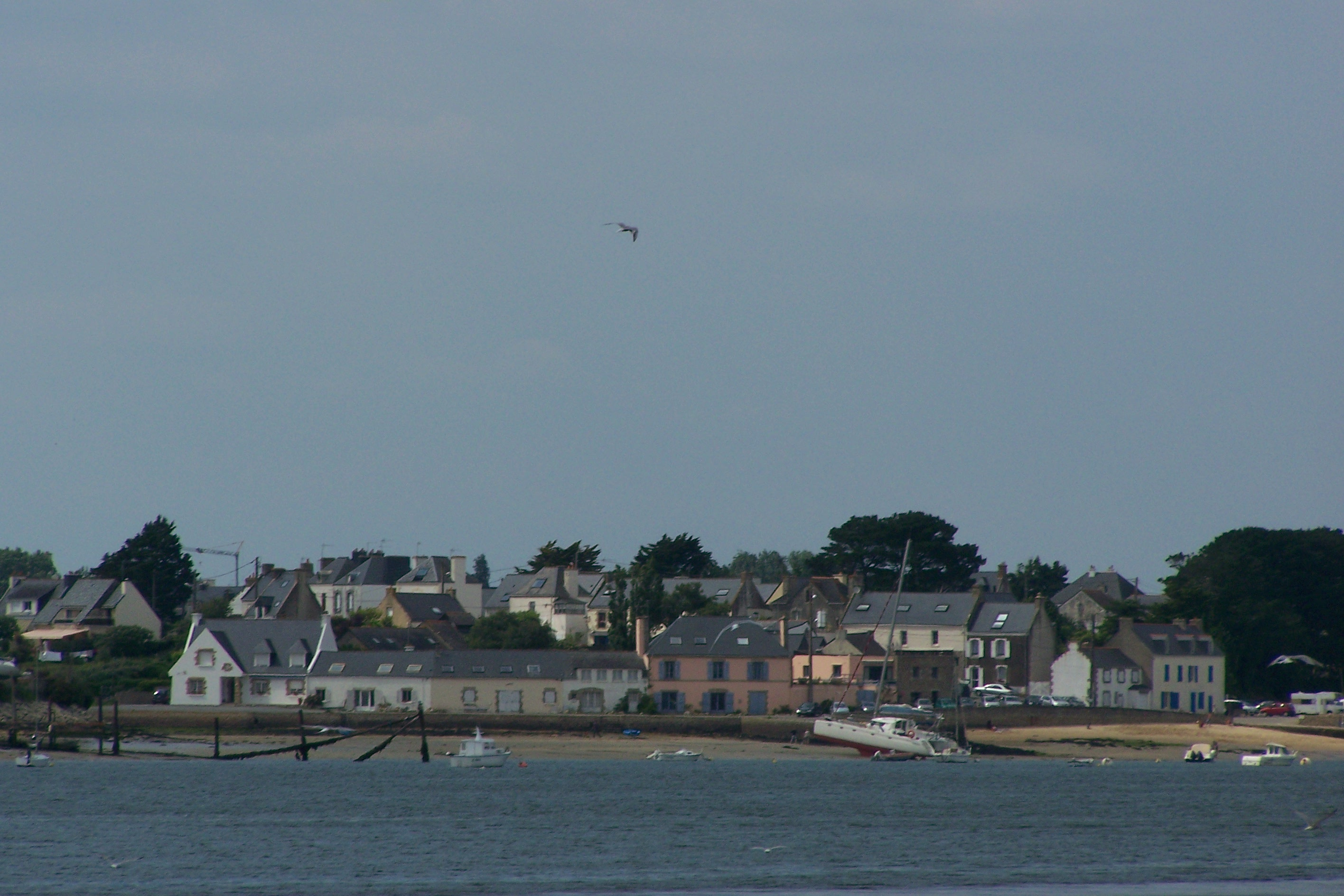 Village du Magouër en bordure de la Ria d'Etel [Commune de Plouhinec (Morbihan)]